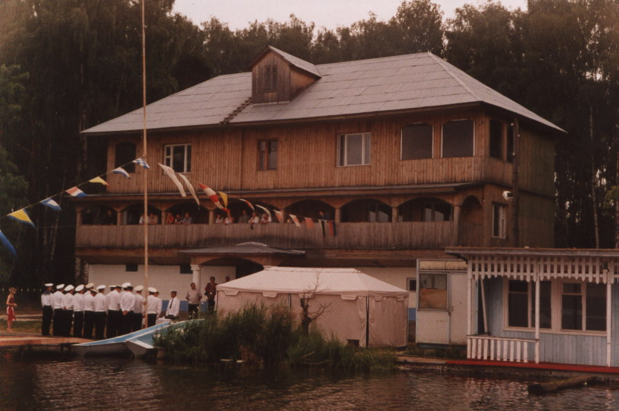 Празднование Дня Флота на ВСБ, Купавна, 2005